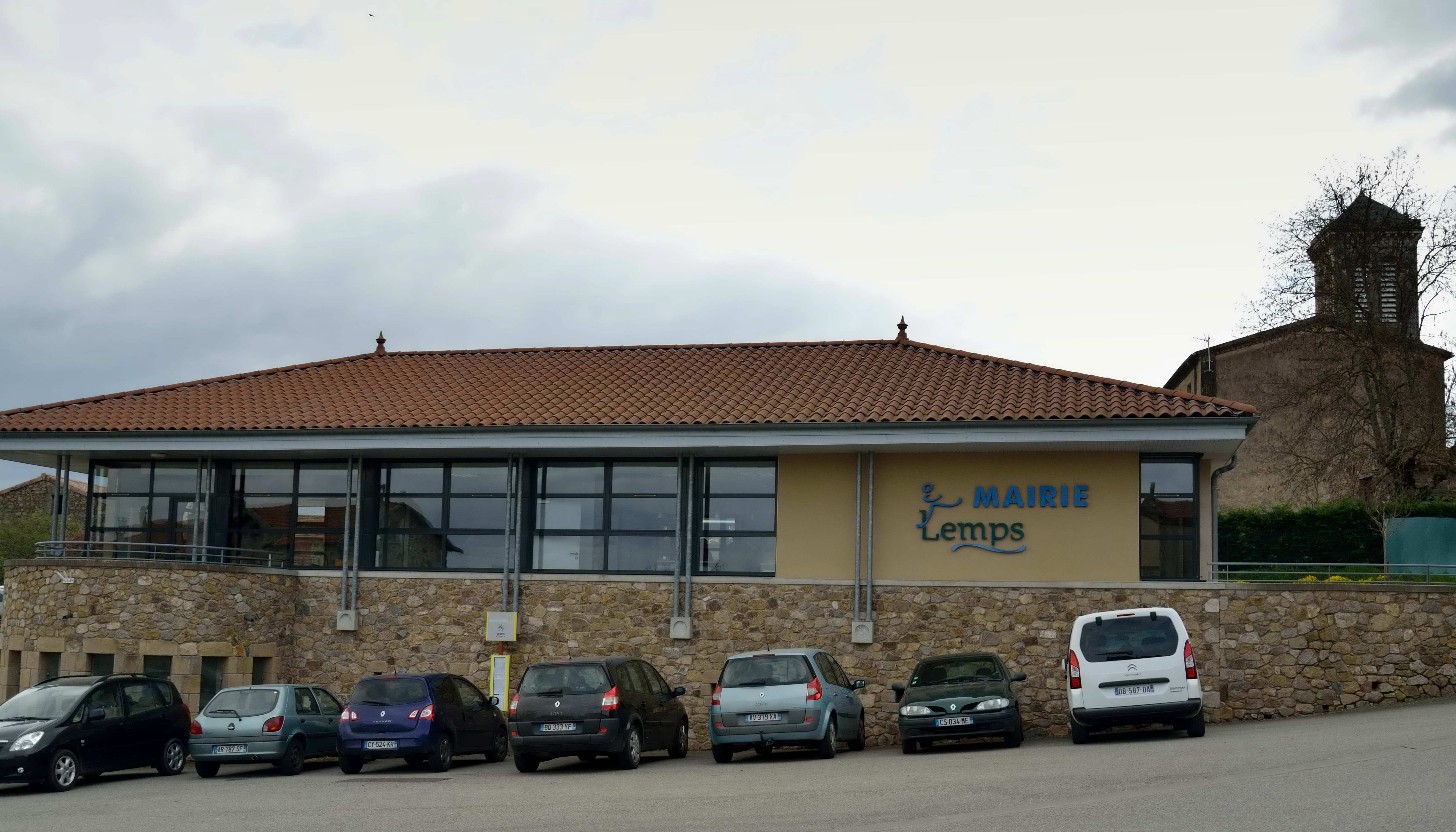 le mairie